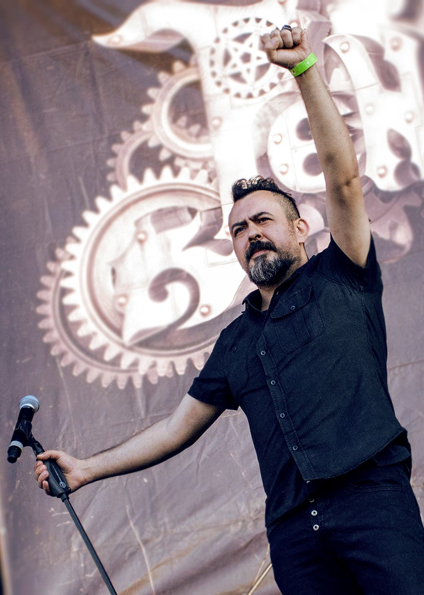 Gökalp Ergen